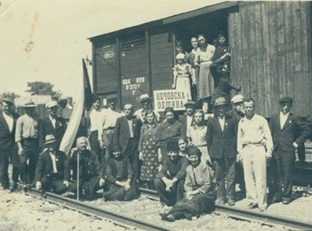 Снимка на жители на с. Кочово, Шуменско на гарата за натоварване и изпращане последния влак с десертно грозде за износ.